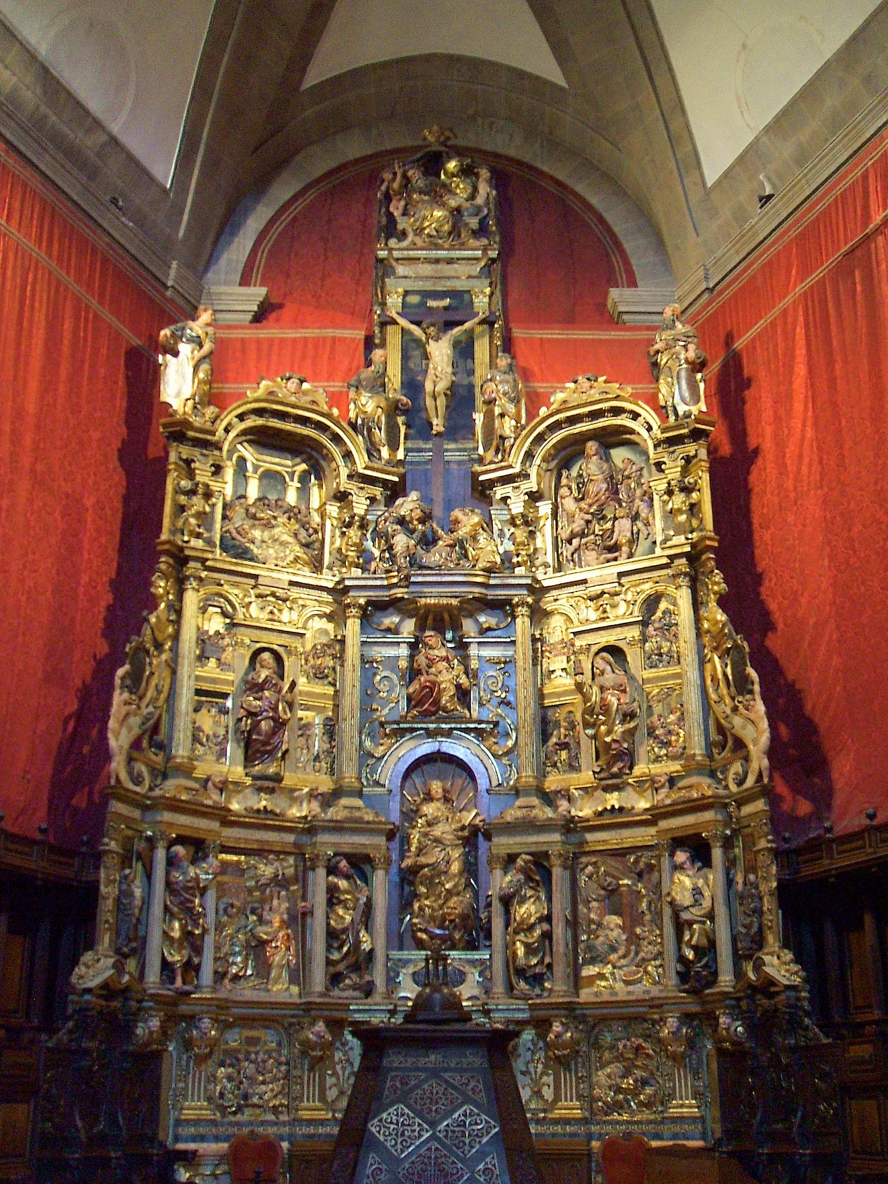 Retablo mayor de la catedral de la Asunción de Valladolid.